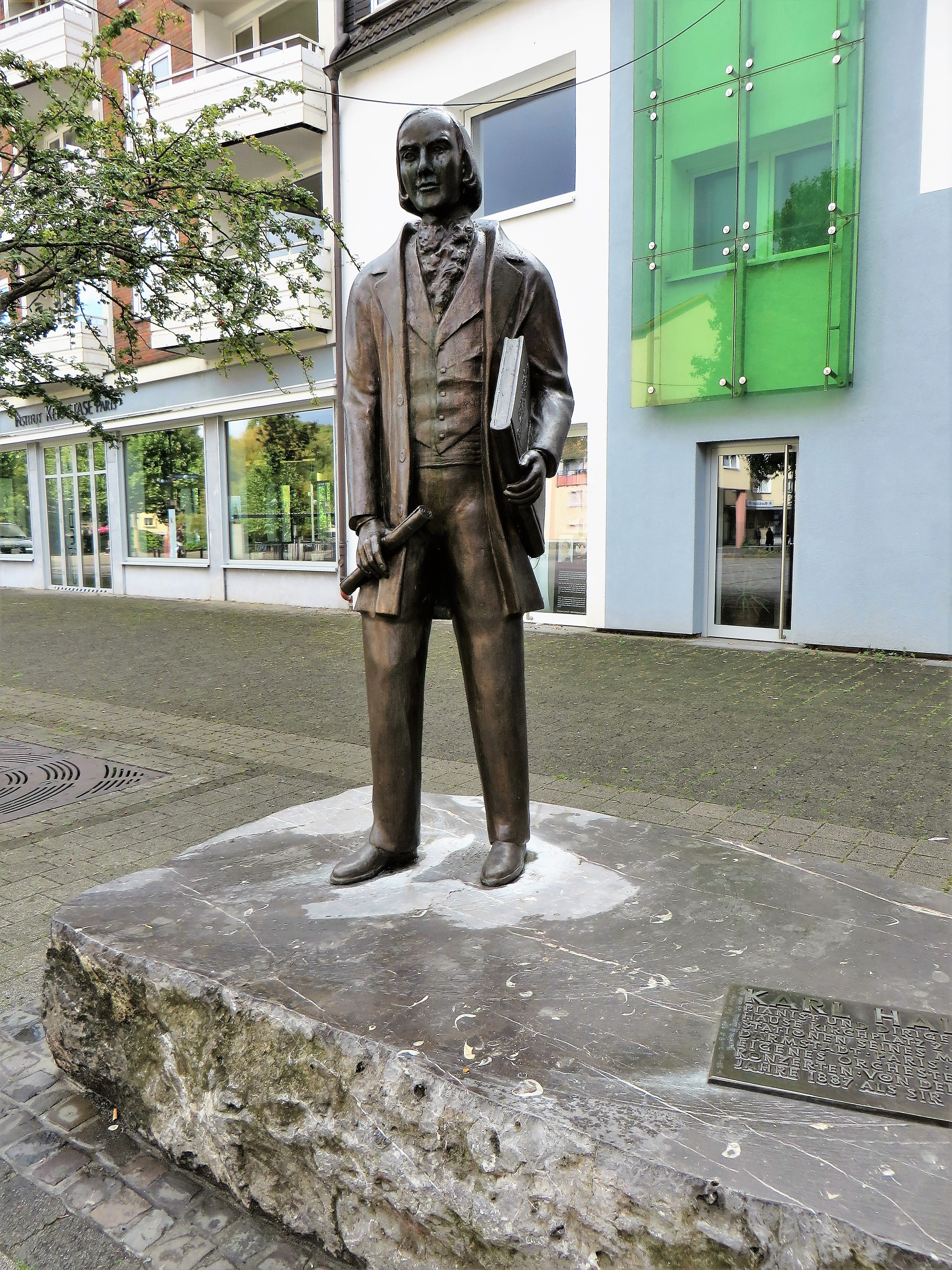 Bronze-Statue des in Hagen geborenen Pianisten und Dirigenten Karl Halle (1819–1895) auf dem Johanniskirchplatz in Hagen. Die 205 cm hohe Statue wurde von dem Hagener Bildhauer Uwe Will gestaltet und in der Glocken- und Kunstgießerei Gescher in Bronze gegossen. Der große Sockelstein kommt aus dem Hohenlimburger Kalksteinbruch und wurde danach von Fachfirmen passend geschnitten und bearbeitet. Am 27. August 2008 wurde das Karl Halle-Denkmal enthüllt.